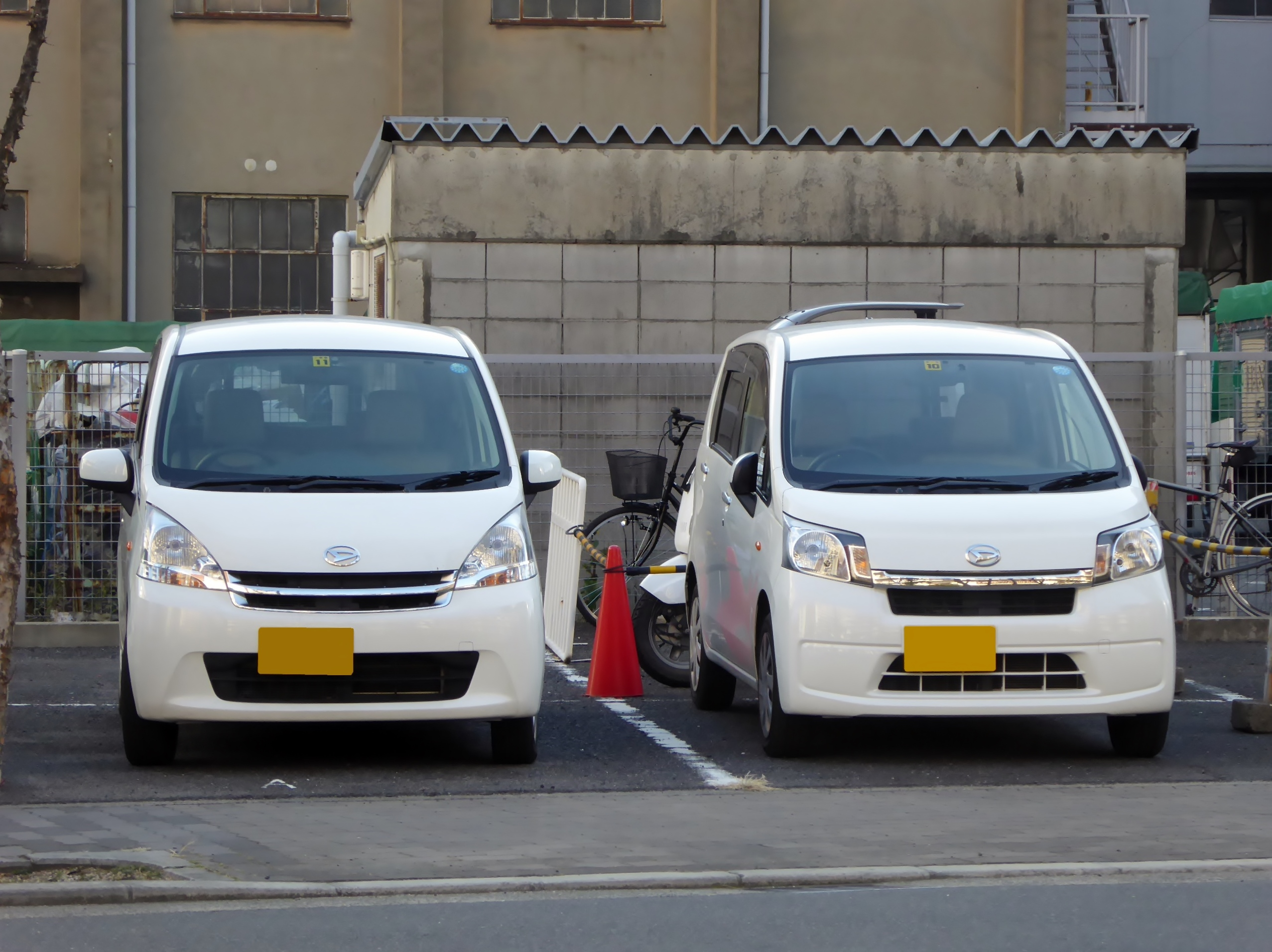 LA100S型ダイハツ・ムーヴの前期型と後期型をそれぞれフロントから撮影。